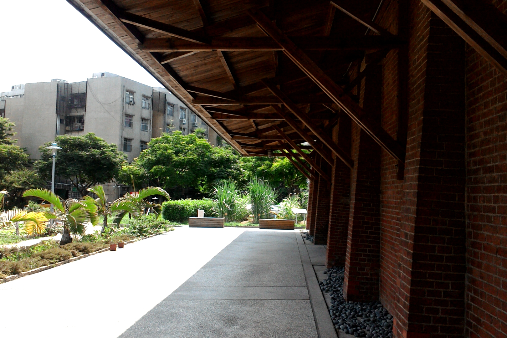 糖廍文化園區A棟倉庫屋簷,台北市萬華區大理次分區糖廍里